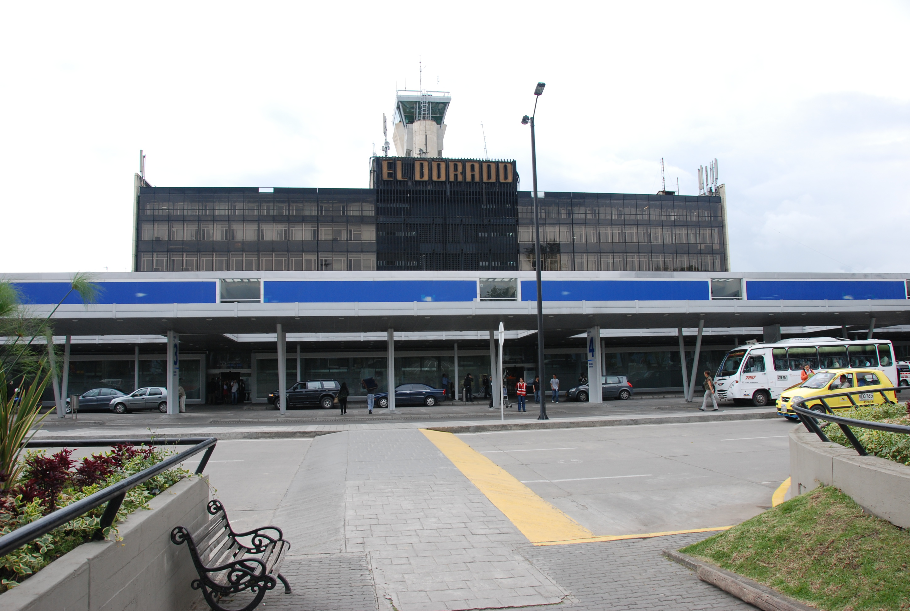 Aeropuerto Internacional El Dorado, Bogotá D.C